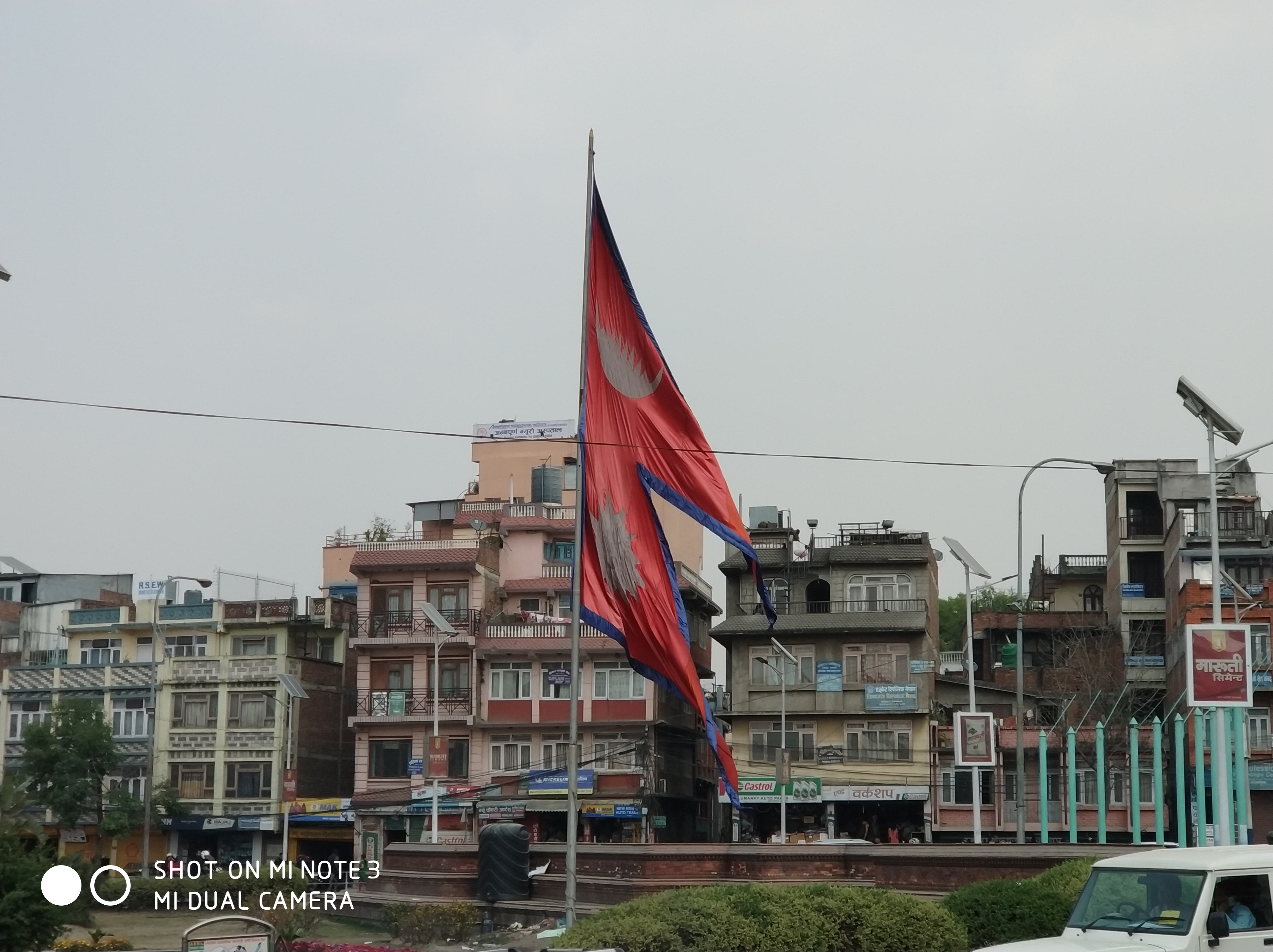 Flag of Nepal at Maitighar mandala Kathmandu.